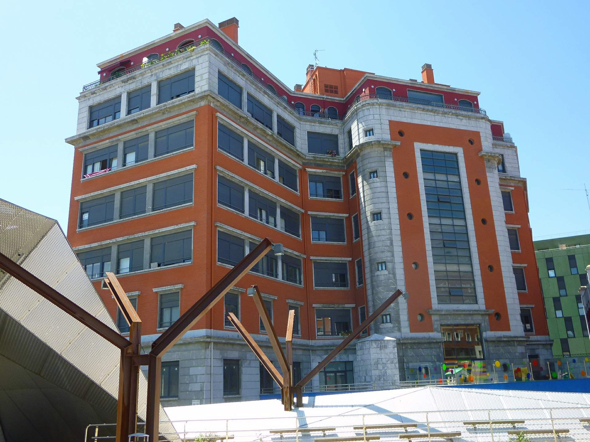 Edificio El Carmen (Antiguas oficinas centrales de Altos Hornos de Vizcaya), en Barakaldo